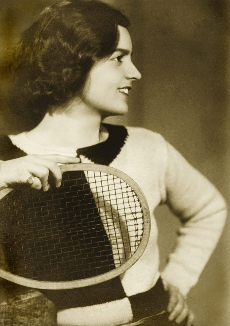 Tasnády Fekete Mária (1911-2001) magyar színésznő, szépségkirálynő